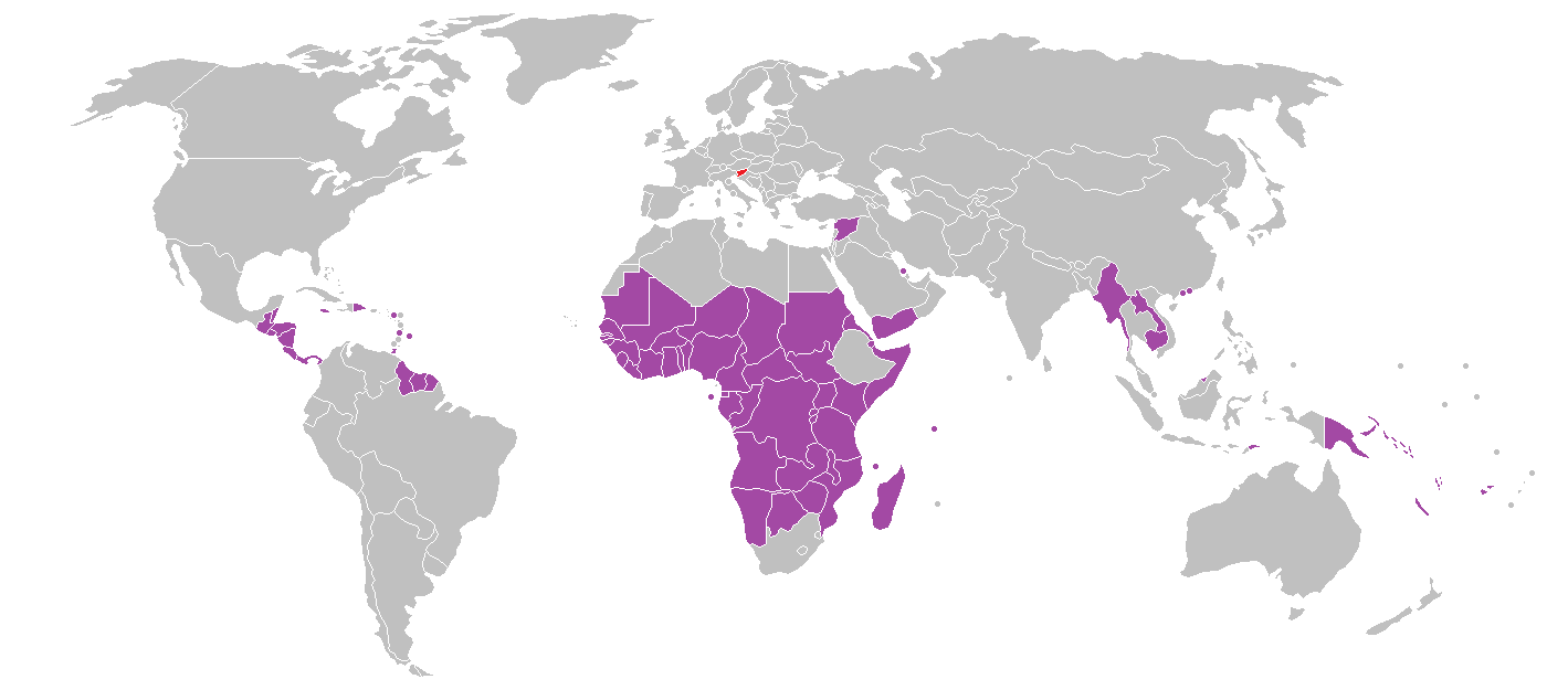 Države v katerih Slovenija nima predstavništev, Slovencem pa so na voljo predstavništva drugih držav članic EU